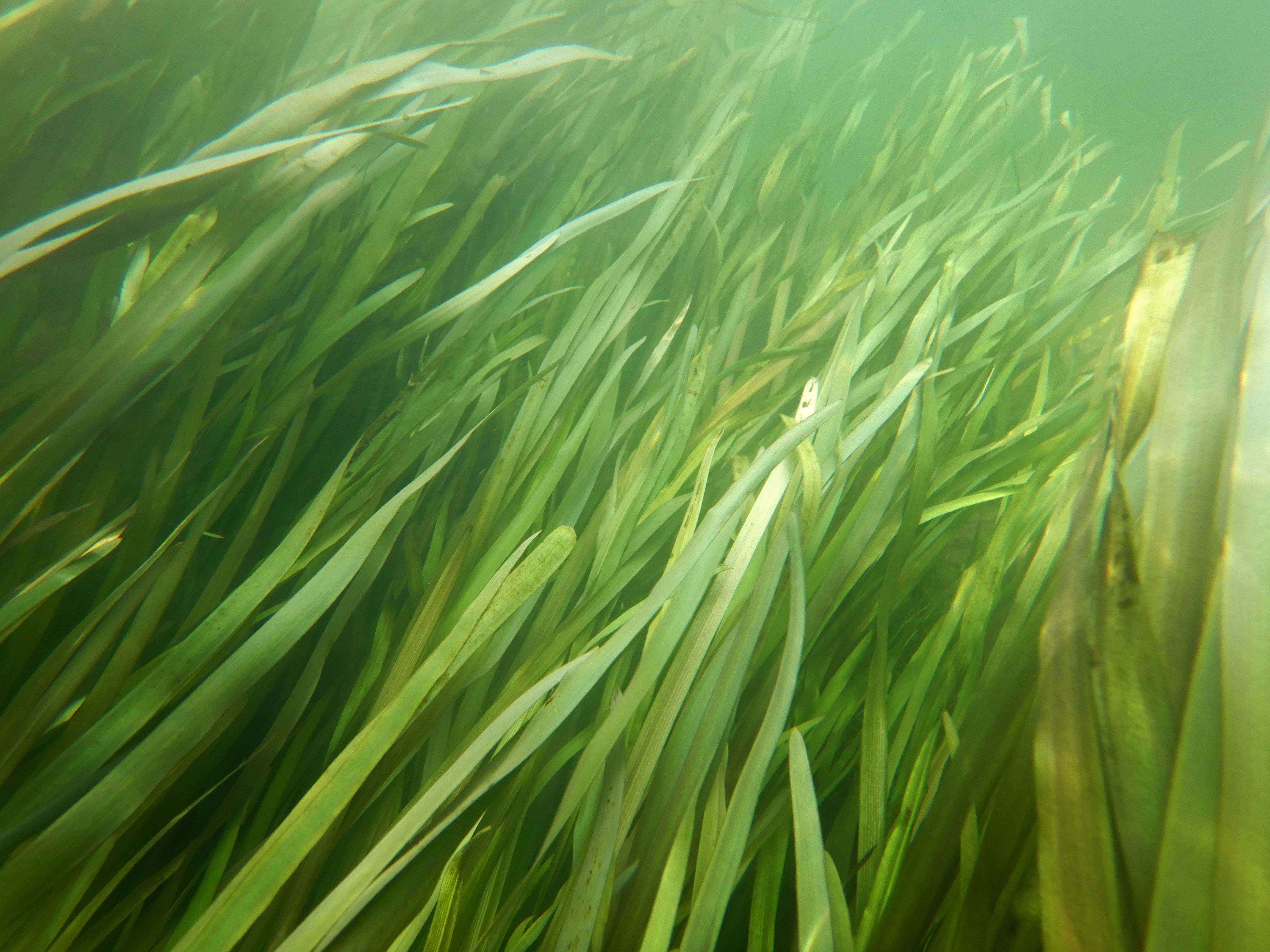 Herbier subaquatique de rubanier (Sparganium erectum) dans le bassin du fleuve Authie (nord de la France, Région Hauts-de-France) le 2017-08-07 (dans le secteur Maintenay-Roussent, dans un fossé de drainage du marais)